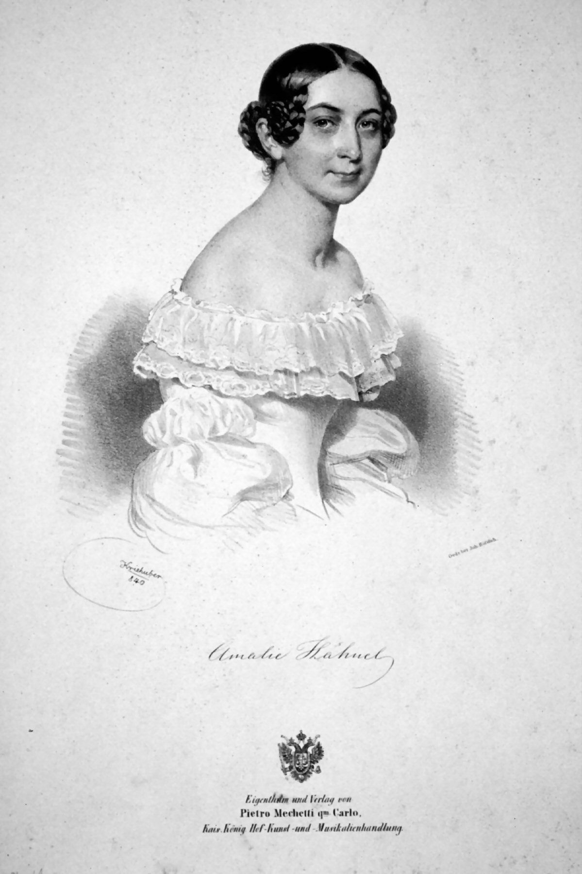 Amalie Hähnel (1807-1849), österreichiasche Sängerin. Lithographie von Josef Kriehuber, 1840.